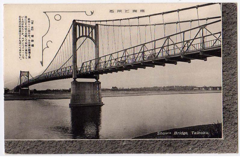 台灣日本統治時代的台北昭和橋，今天的「光復橋」